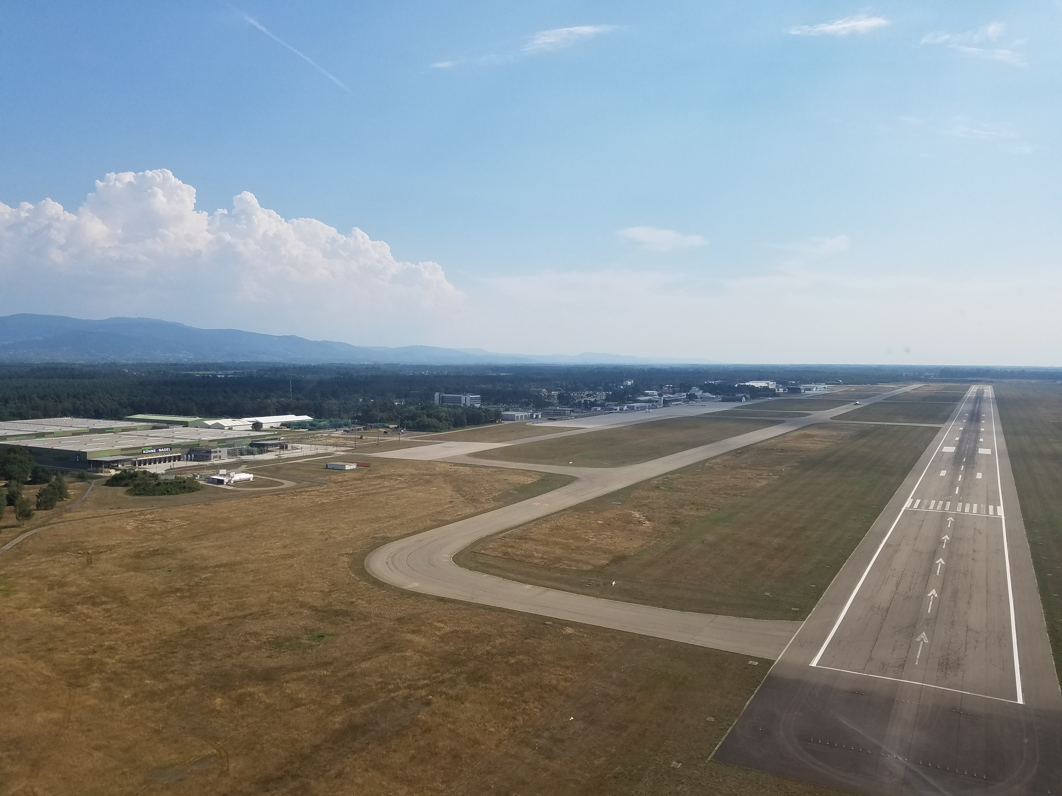 Luftaufnahme des Flughafen Karlsruhe/Baden-Baden im Jahr 2018